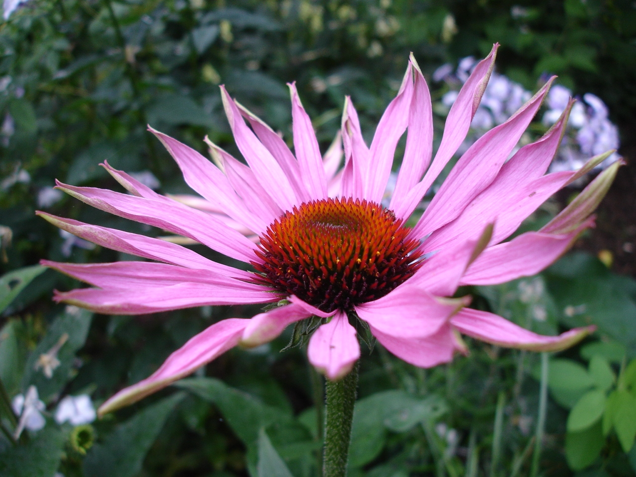 Echinacea purpurea 'Maxima'